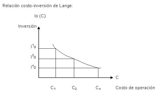 Relación Costo-Inversión